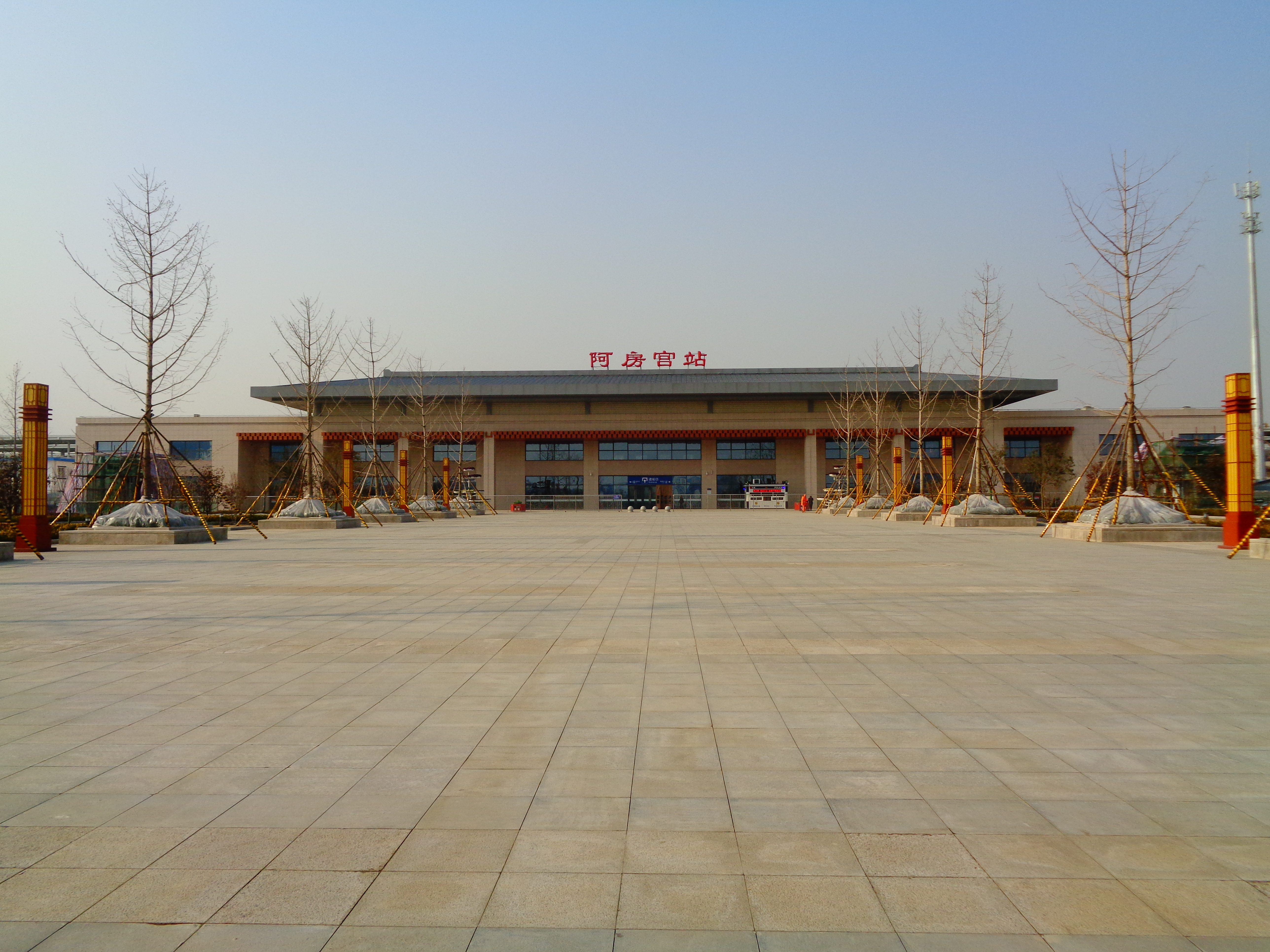 西安市长安区（西咸新区沣东新城）阿房宫站站前及广场